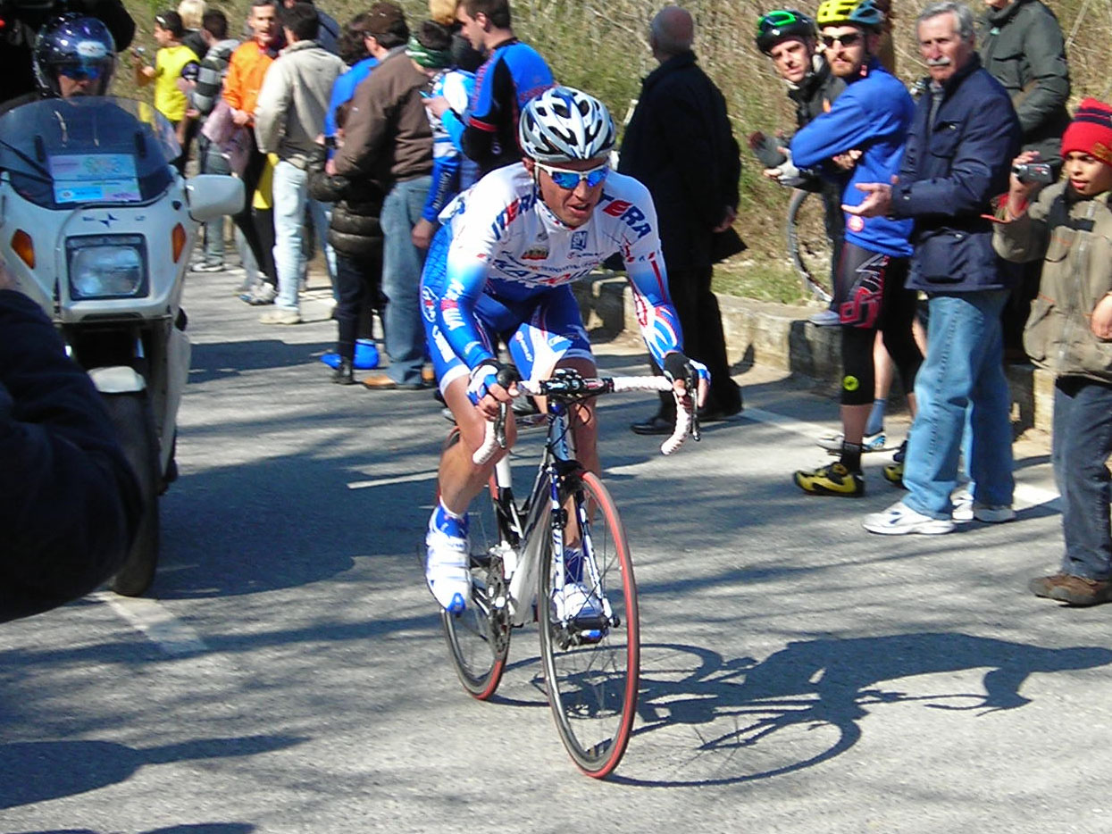 Mikhail Ignatiev sulle Manie alla Milano-Sanremo 2009